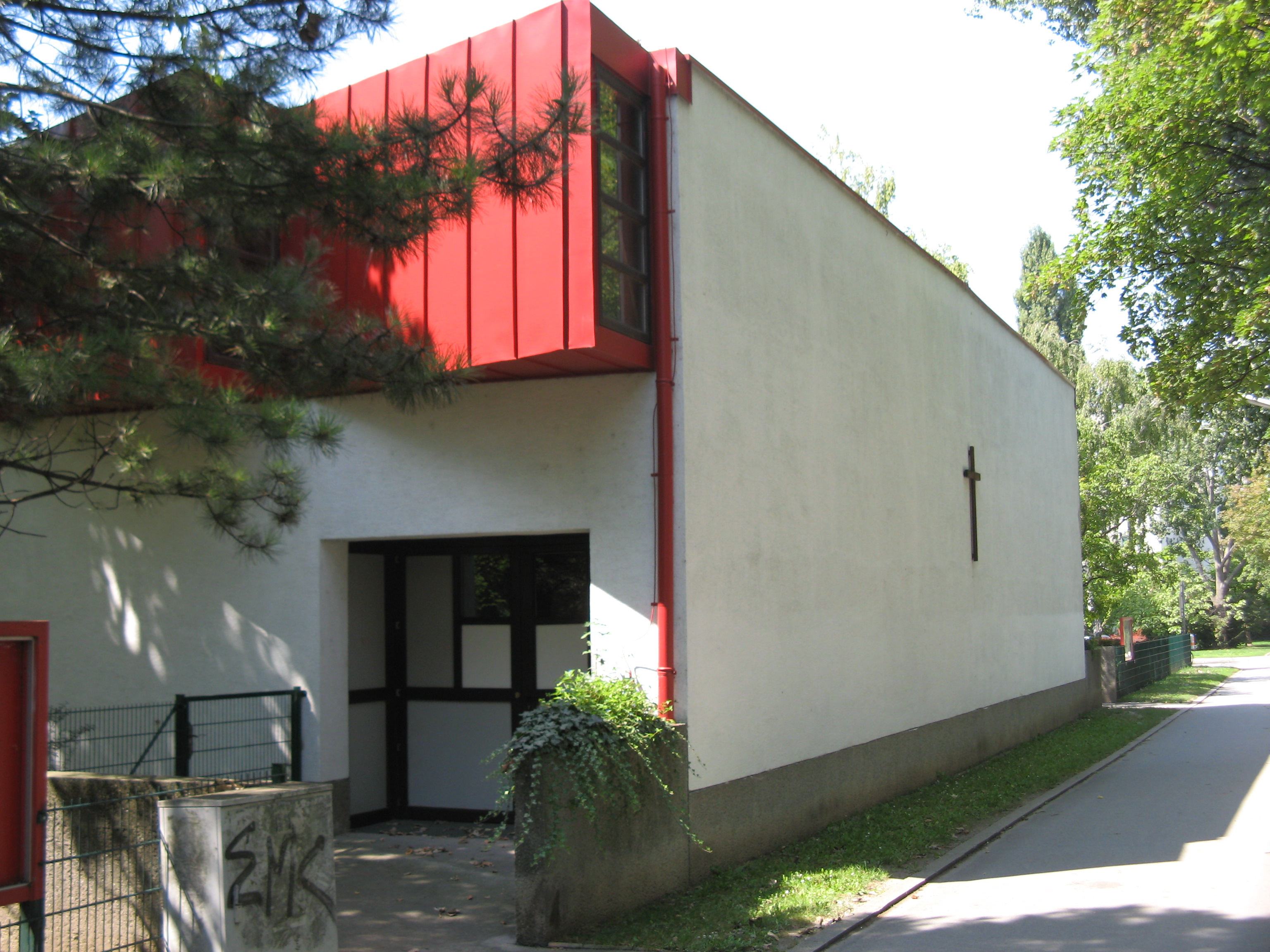 Pfarrkirche St. Paul, Jura-Soyfer-Gasse, Per-Albin-Hansson-Siedlung Ost, Wien-Favoriten